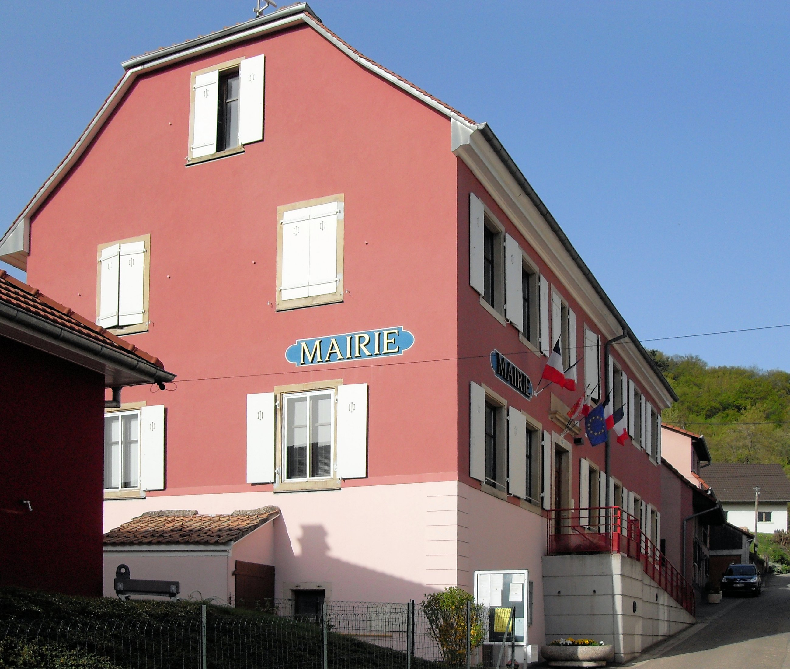 La mairie de Wittersdorf